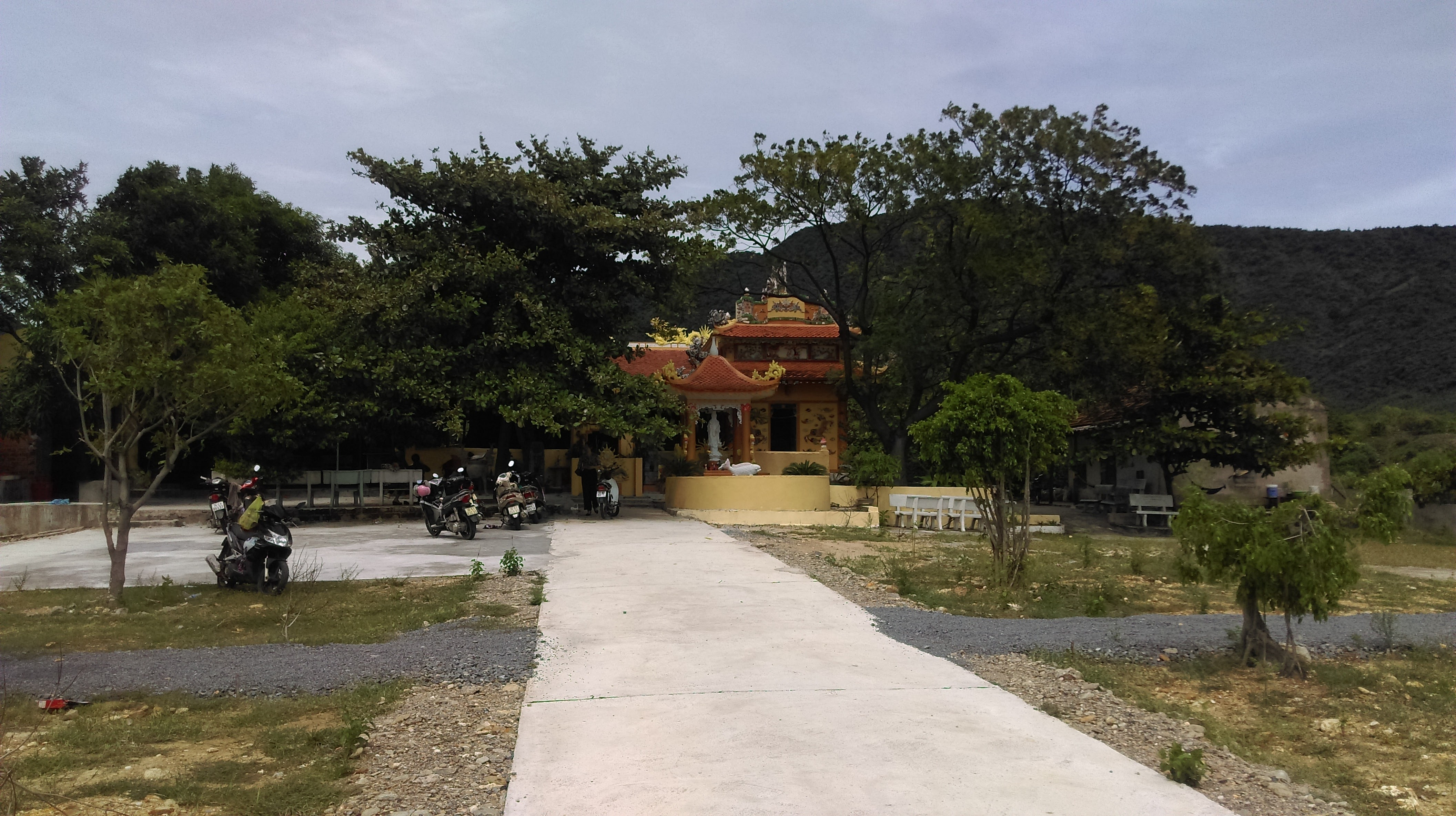 Đền Thánh Mẫu Liễu Hạnh, Kỳ Nam, Kỳ Anh, Hà Tĩnh